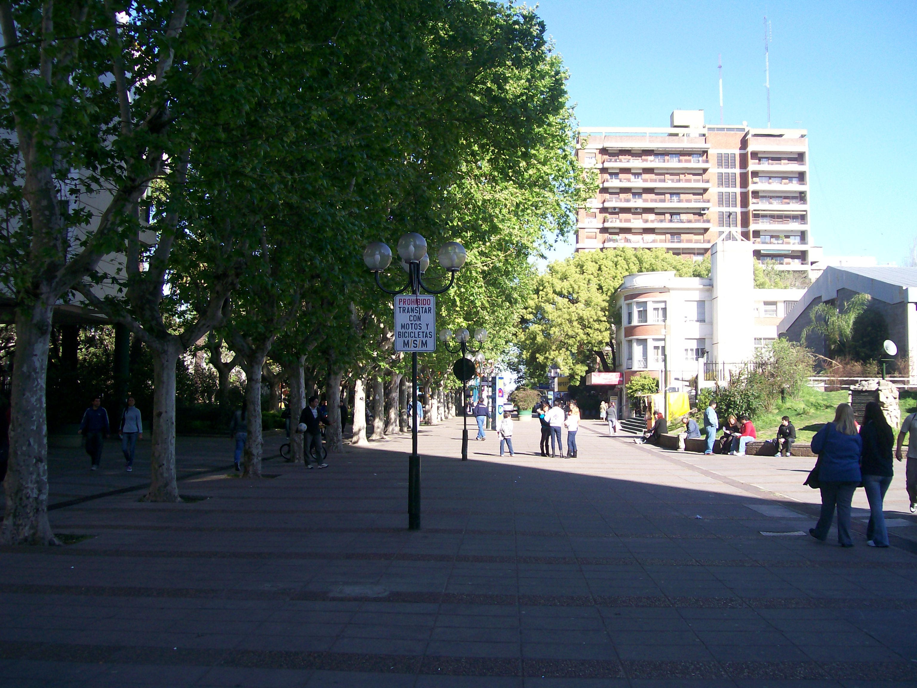 via Civitanova Marce, Plaza de San Martín, Buenos Aires